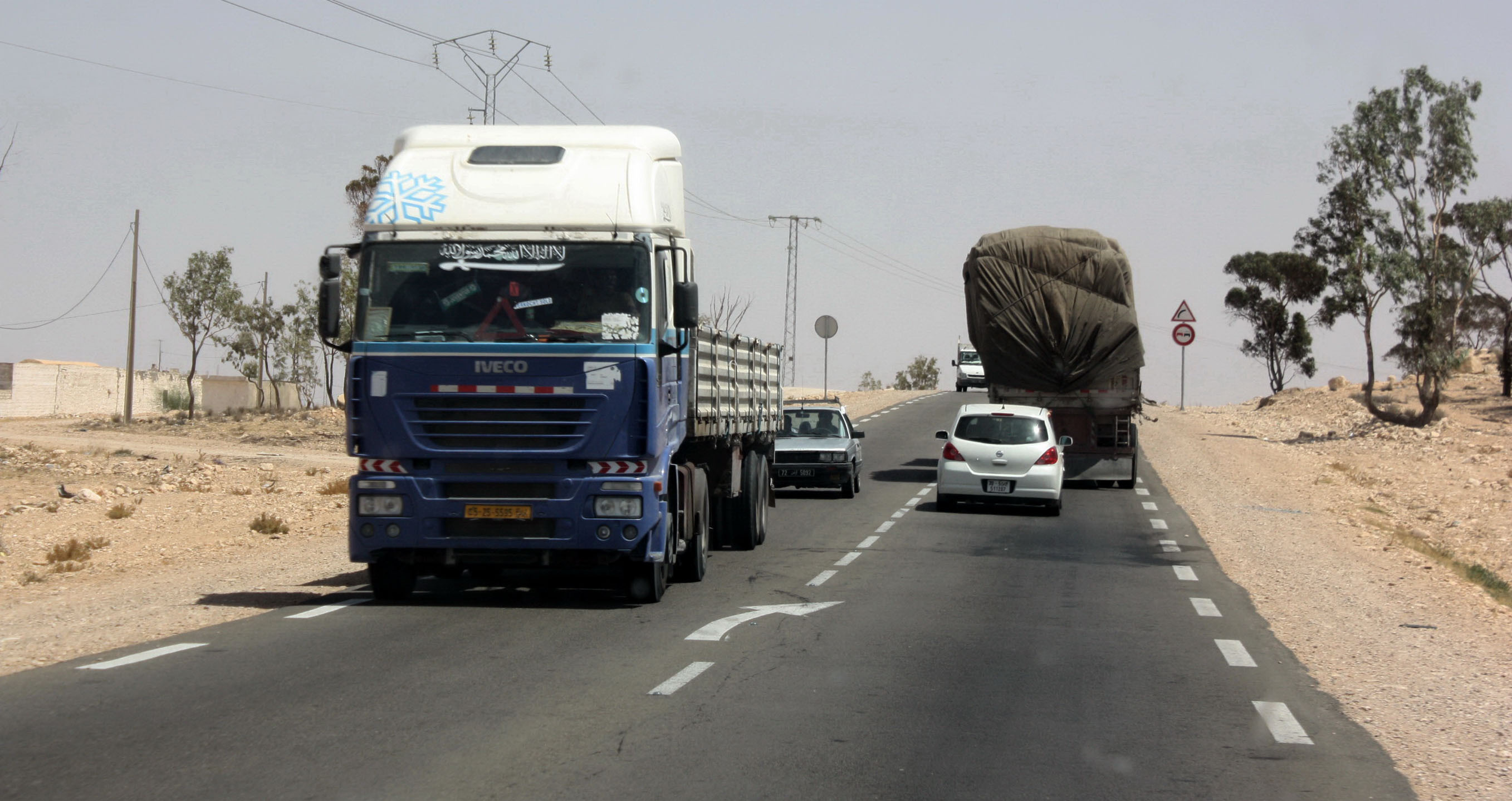 [Mohamed El Hedef] The African Development Bank has financed several projects since the Tunisian revolution. البنك الإفريقي للتنمية موّل عدة مشاريع منذ الثورة التونسية La Banque africaine de développement a financé plusieurs projets depuis la révolution tunisienne.